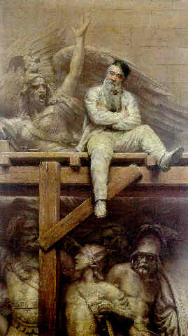 Joseph-Noël Sylvestre: François Rude bei der Arbeit auf dem Pariser Arc de Triomphe (François Rude travaillant sur l'Arc de Triomphe). Öl auf Leinwand - 168,5 × 97 cm. Versteigerung bei Christie's New York am 22.5.1997 für 48.000 US-Dollar; aktueller Aufbewahrungsort unbekannt laut La Tribune de l'Art.